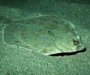 Dil Balığı